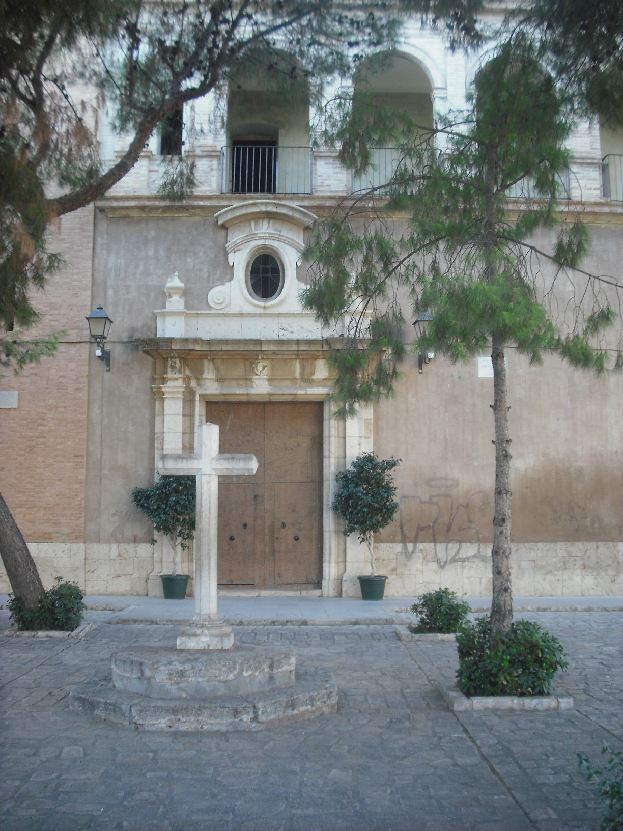 Portada i creu de l'església de Rocafort.